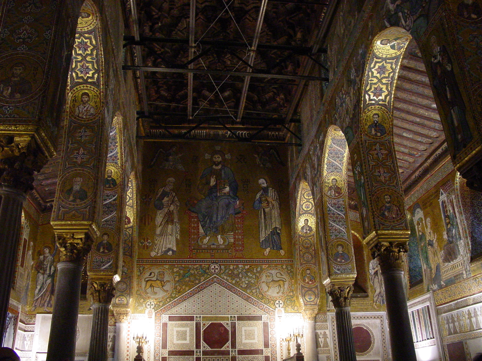 Palermo - Capela palatina - mosaicos bizantinosSICÍLIA 2004 163